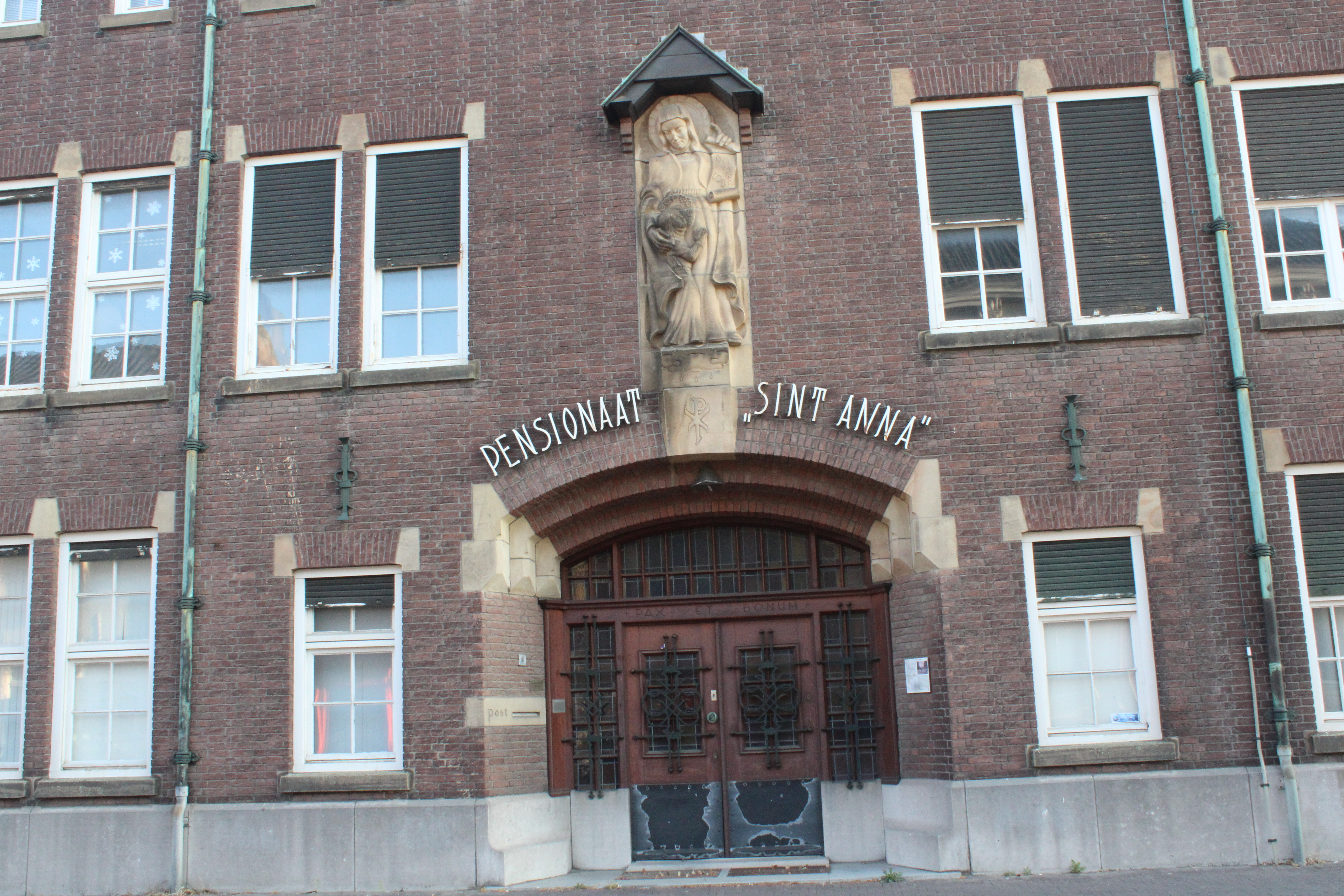 Ingang pensionaat St. Anna in Oudenbosch (gem. Halderberge)